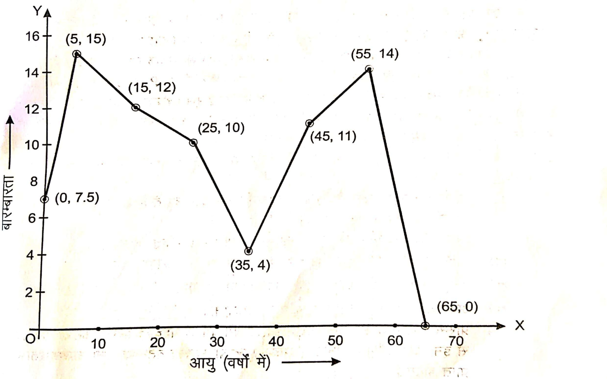 बारम्बारता बहुभुज(बिना आयत चित्र)